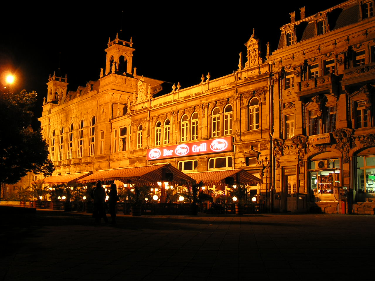 Ruse, Bulgaria